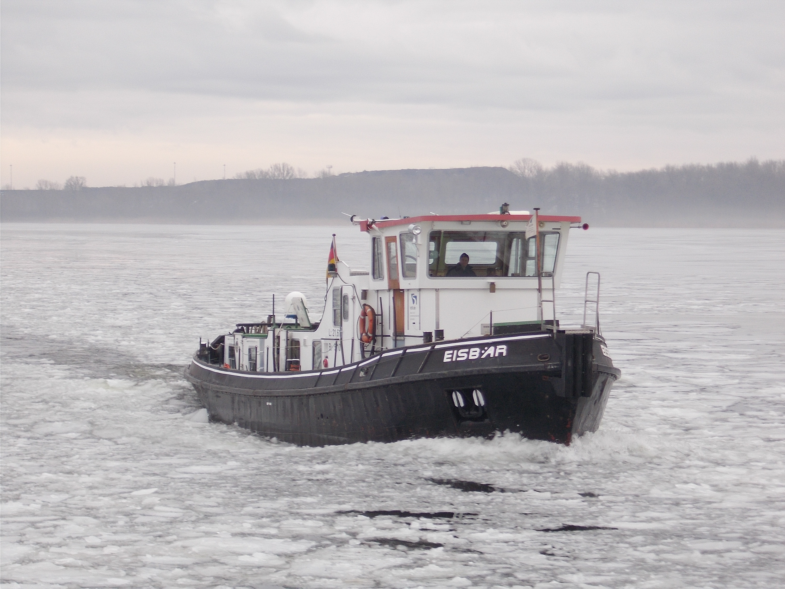 Eisbrecher Eisbär im Einsatz auf der Havel, Plauer See, Brandenburg.